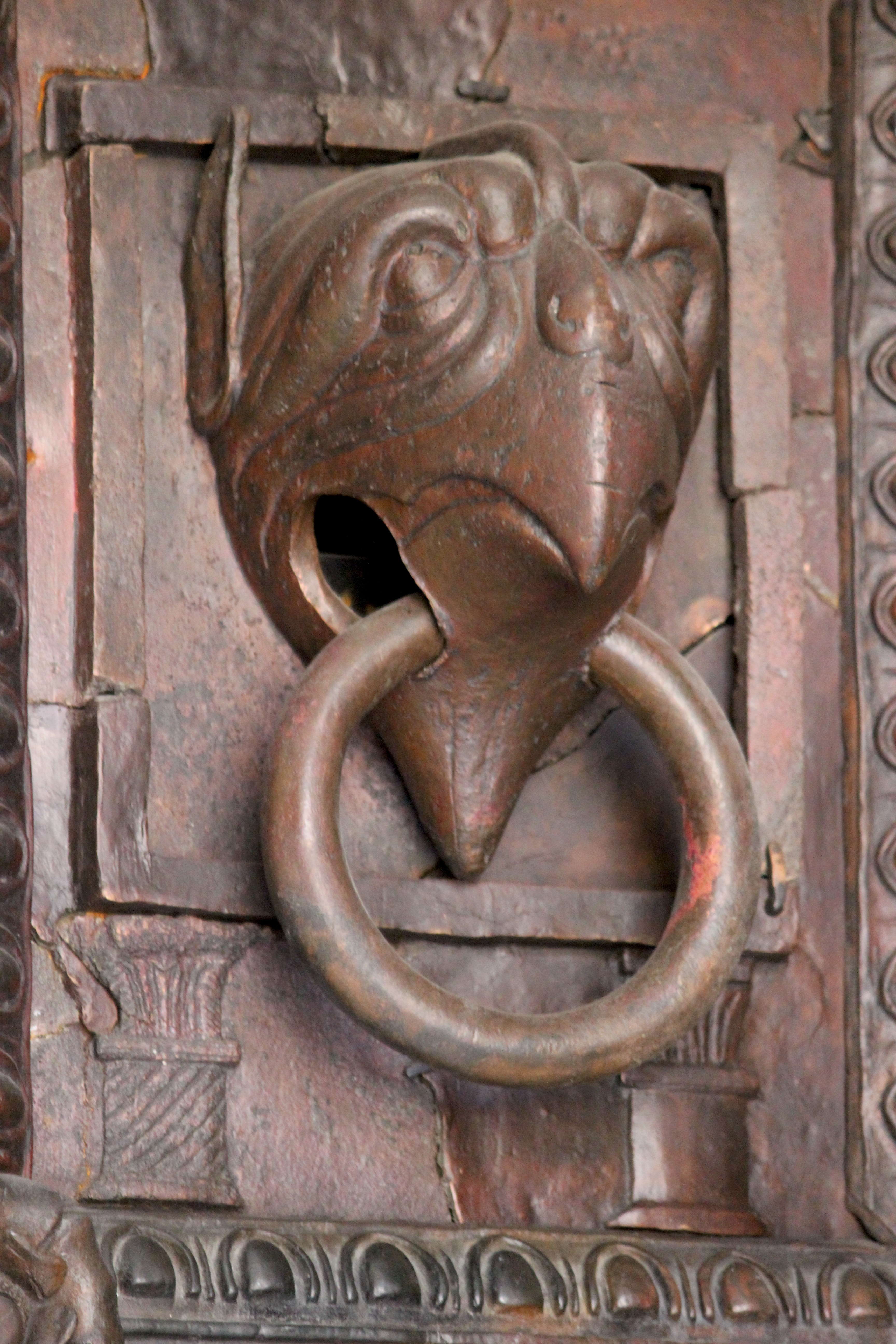 Benevento. Catedral, puerta de bronce románica, atribuida (al menos en parte) a Oderisio da Benevento. s. XII.